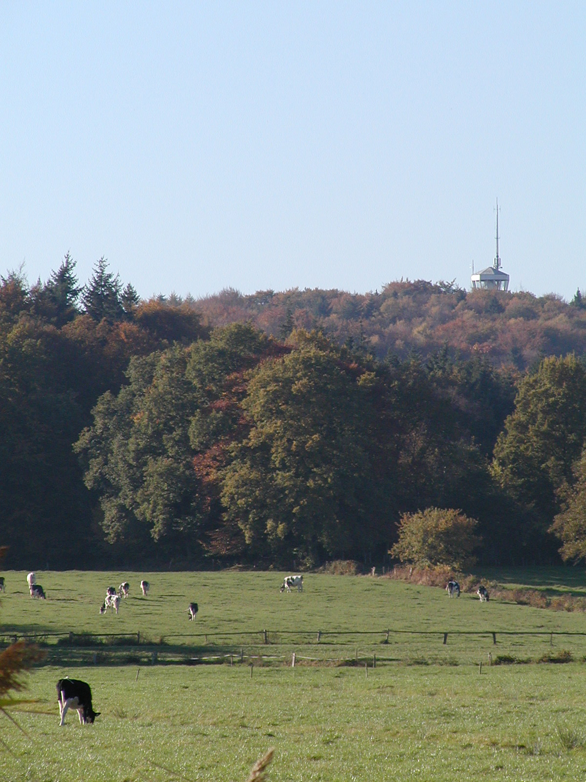 Der Aussichtsturm auf dem Berg "Deutscher Olymp"